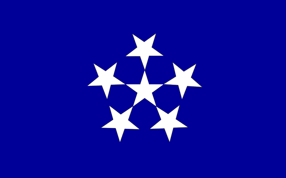 Balkanic Union flag symbolising unity (middle), and turning as a watch from the left star : Slavic peoples, Romance peoples, Turks, Greeks, Albanese. (Since the New Filiki Eteria, Thessaloniki.)